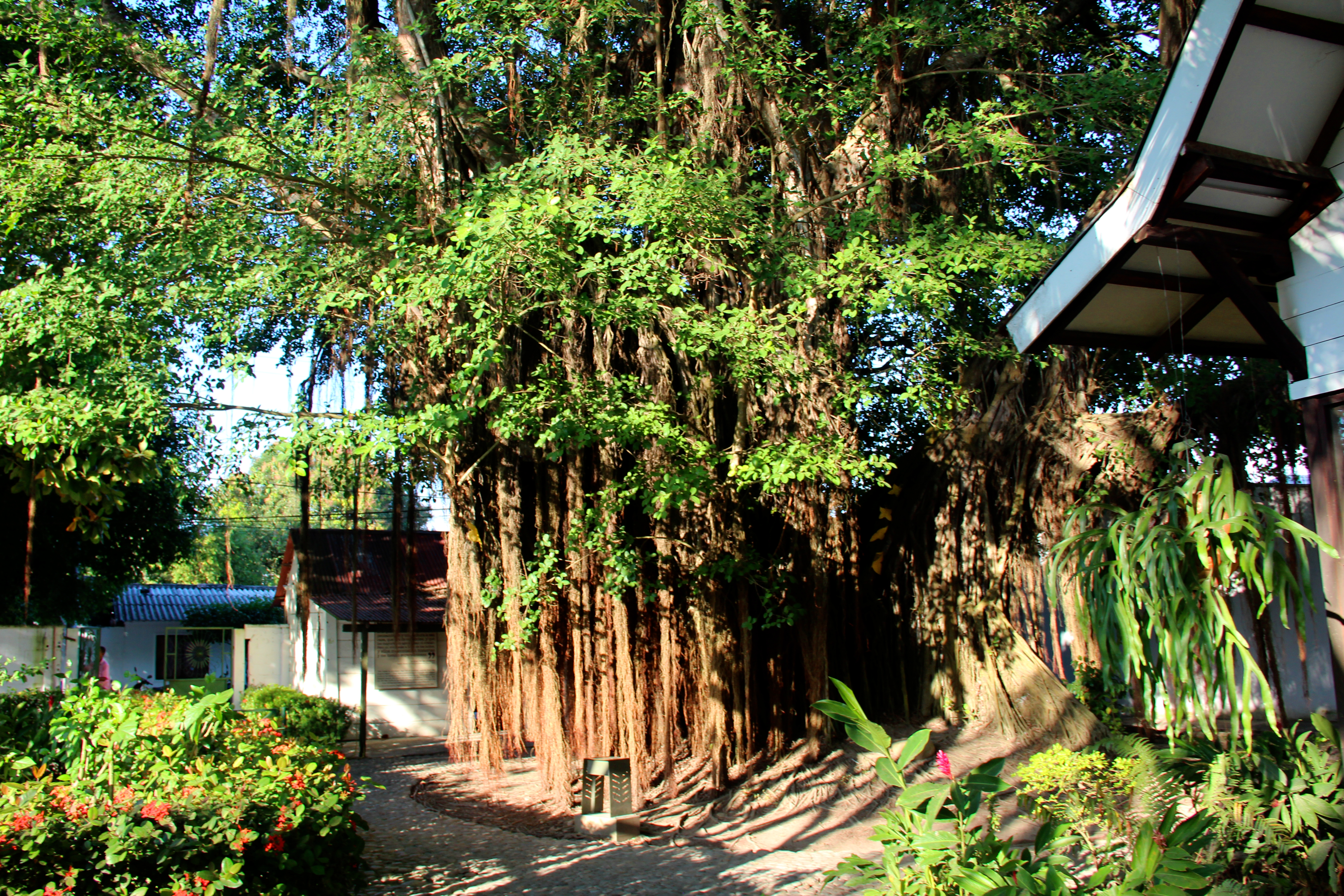 Árbol en el traspatio de la Casa Natal del escritor Gabriel García Márquez en el municipio de Aracataca, Departamento del Magdalena de Colombia. También conocida como Casa Museo Gabriel García Márquez. Centro Cultura. Fue declarado como bien de interés cultural a través del Decreto 480 del 13 de marzo de 1996. "...y por último, el traspatio enorme de árboles frutales con la letrina única donde las indias del servicio vaciaban de día y de noche las bacinillas de la casa. El árbol más frondoso y hospitalario era un castaño al margen del mundo y del tiempo, bajo cuyas fondas arcaicas debieron de morir orinando mas de dos coroneles jubilados de las tantas guerras civiles ..." Fragmento de Vivir para contarla de G. Márquez junto a este árbol.